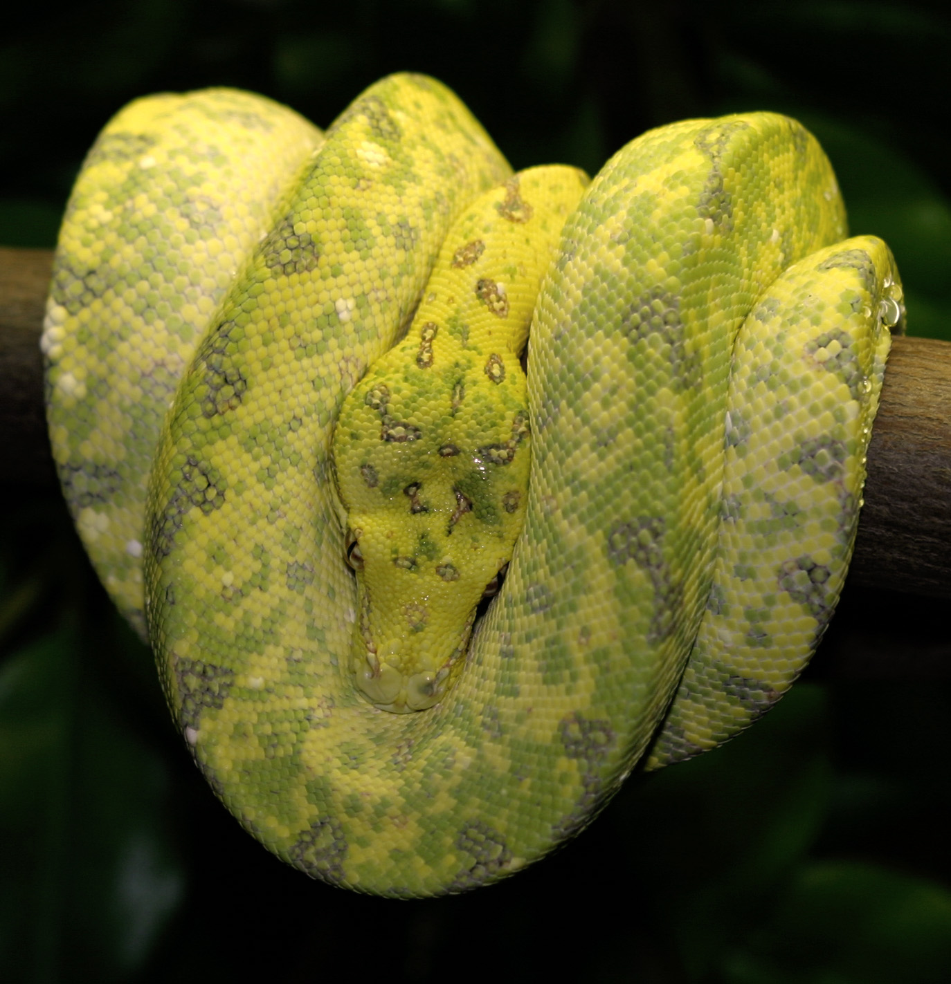 Grüner Baumpython (Morelia viridis), während der Umfärbung